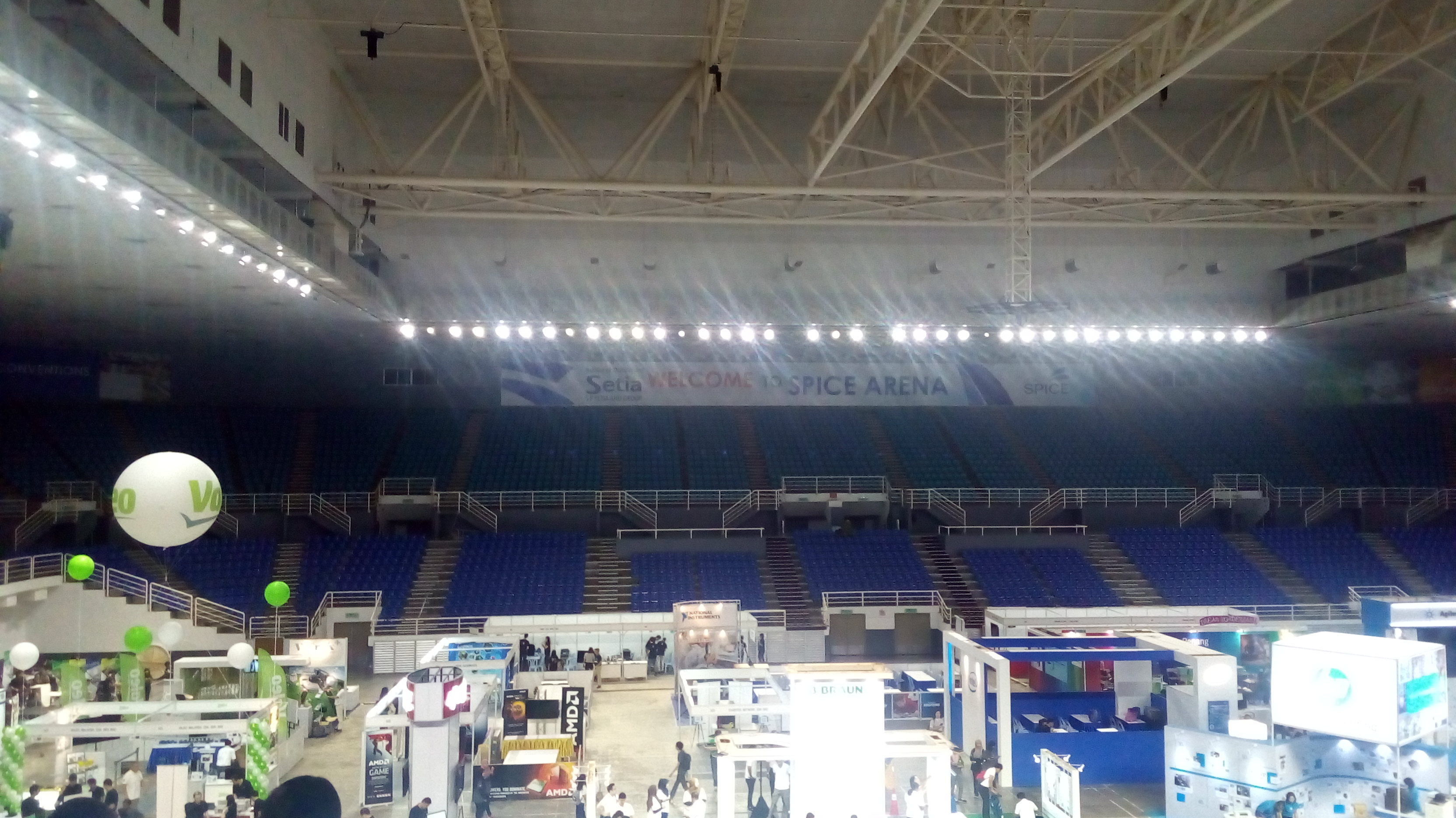 槟城国际会展中心竞技场内部